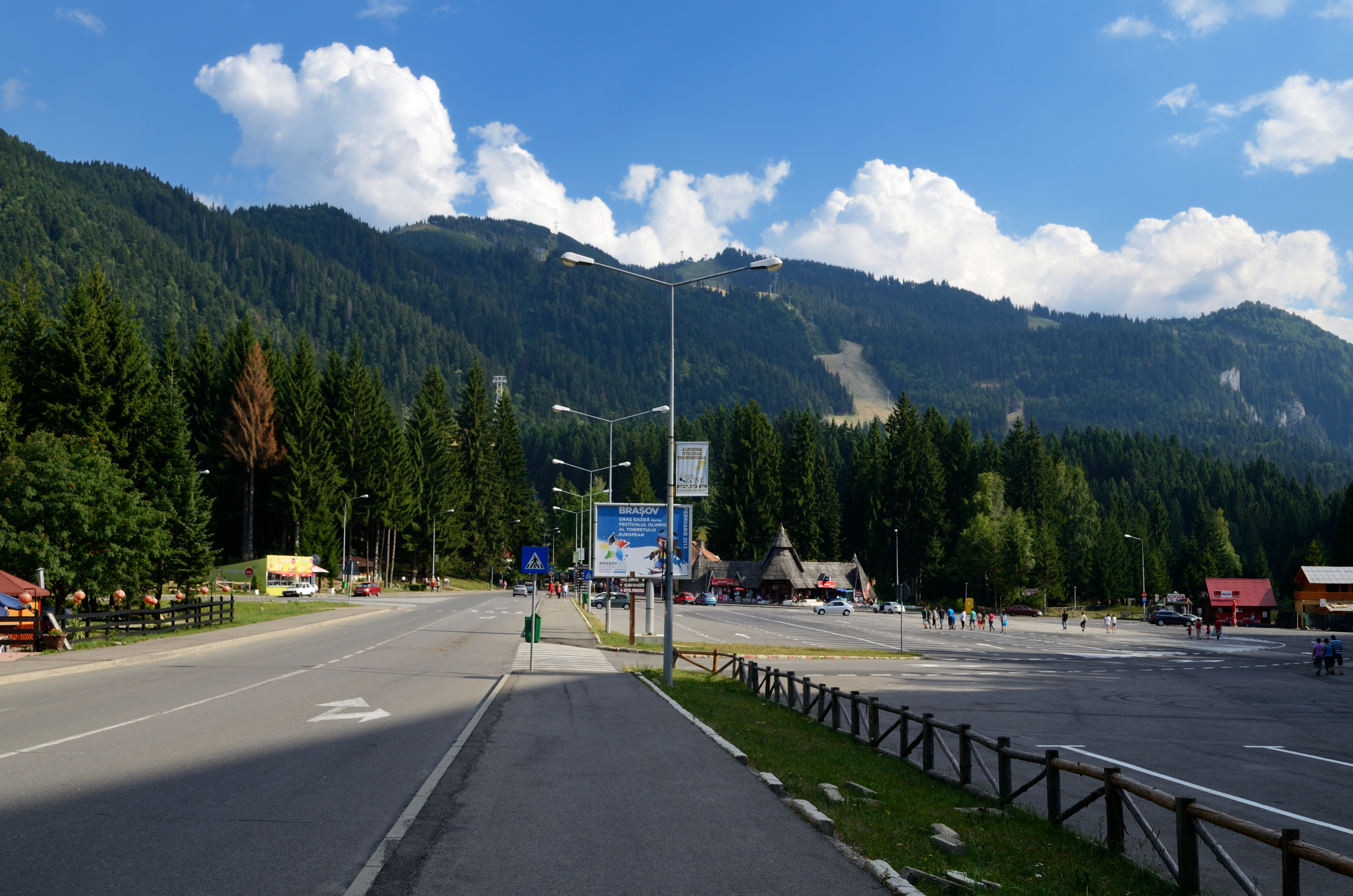 Српски (ћирилица): Појана Брашов и масив Поставарул у позадини